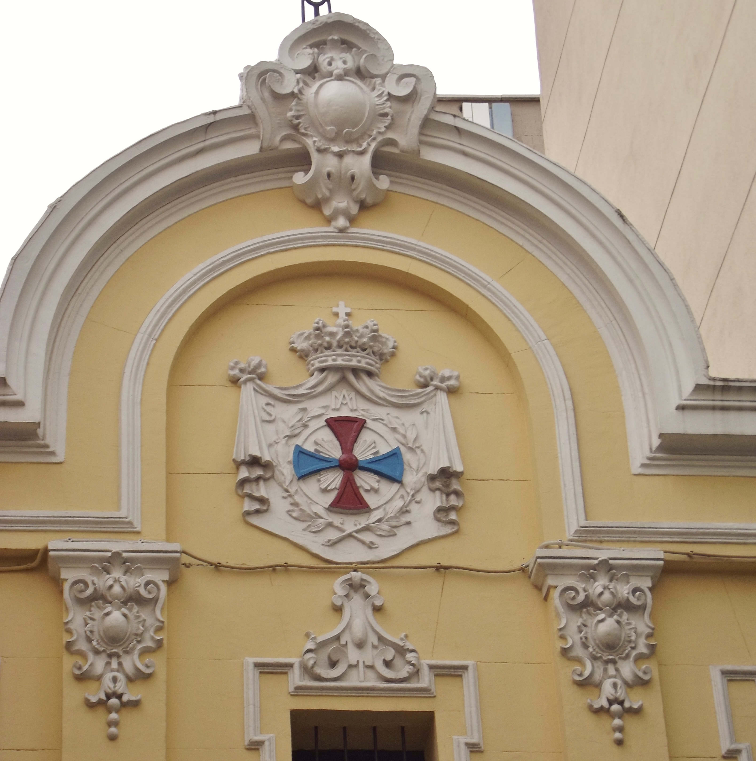 Cruz Trinitaria en Madrid en la calle del doctor Cortezo